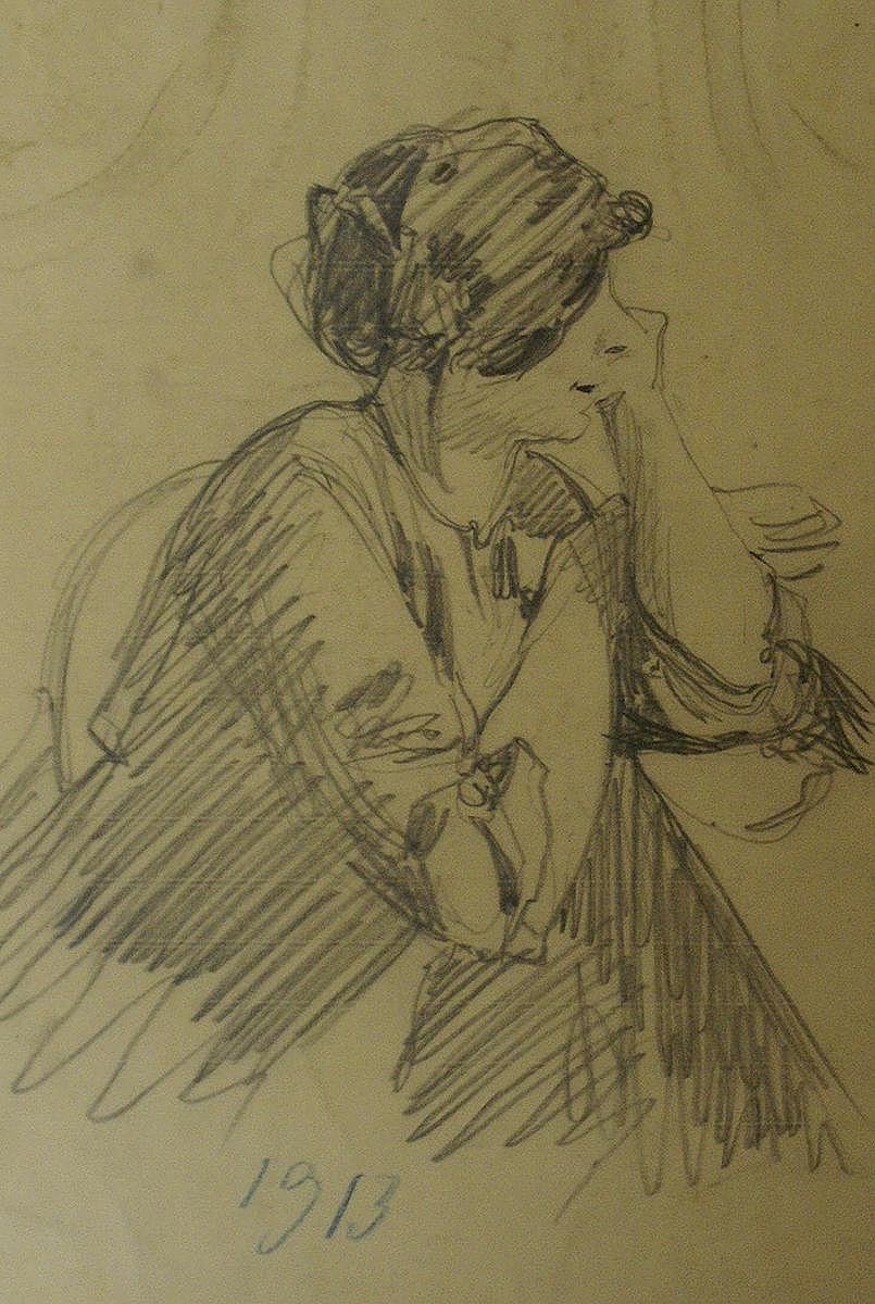 Набросок портрета Анны Карловны Бенуа